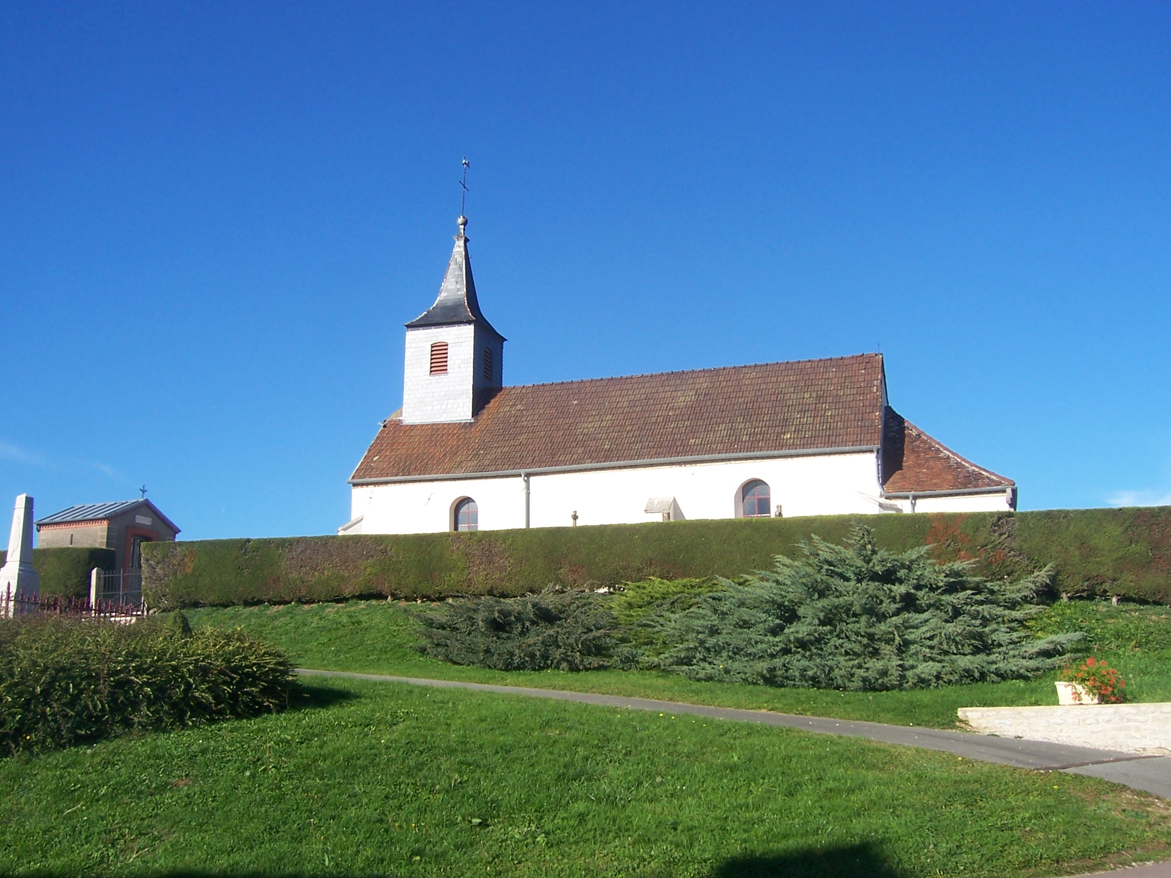 Eglise du Tartre